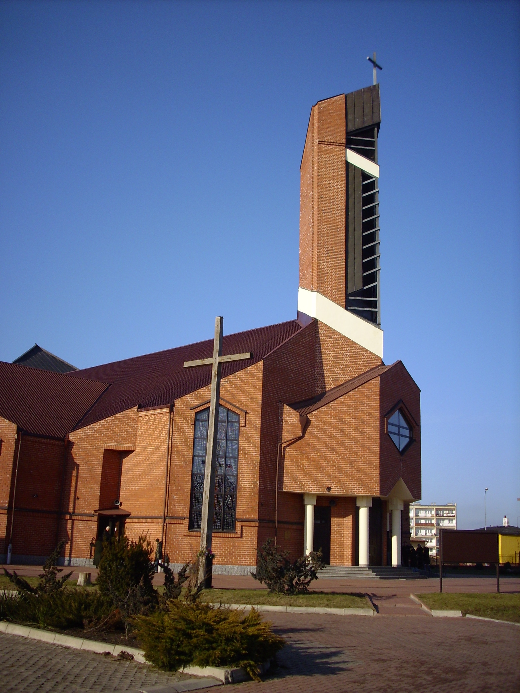 Biała Podlaska, ul. Terebelska 50A, kościół rzymskokatolicki pw. bł. Honorata Koźmińskiego.